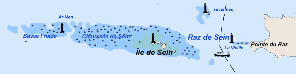 Description : Chaussée de Sein et Raz de Sein Place : Bretagne, France Date : 2006 Author : Réalisation Pline